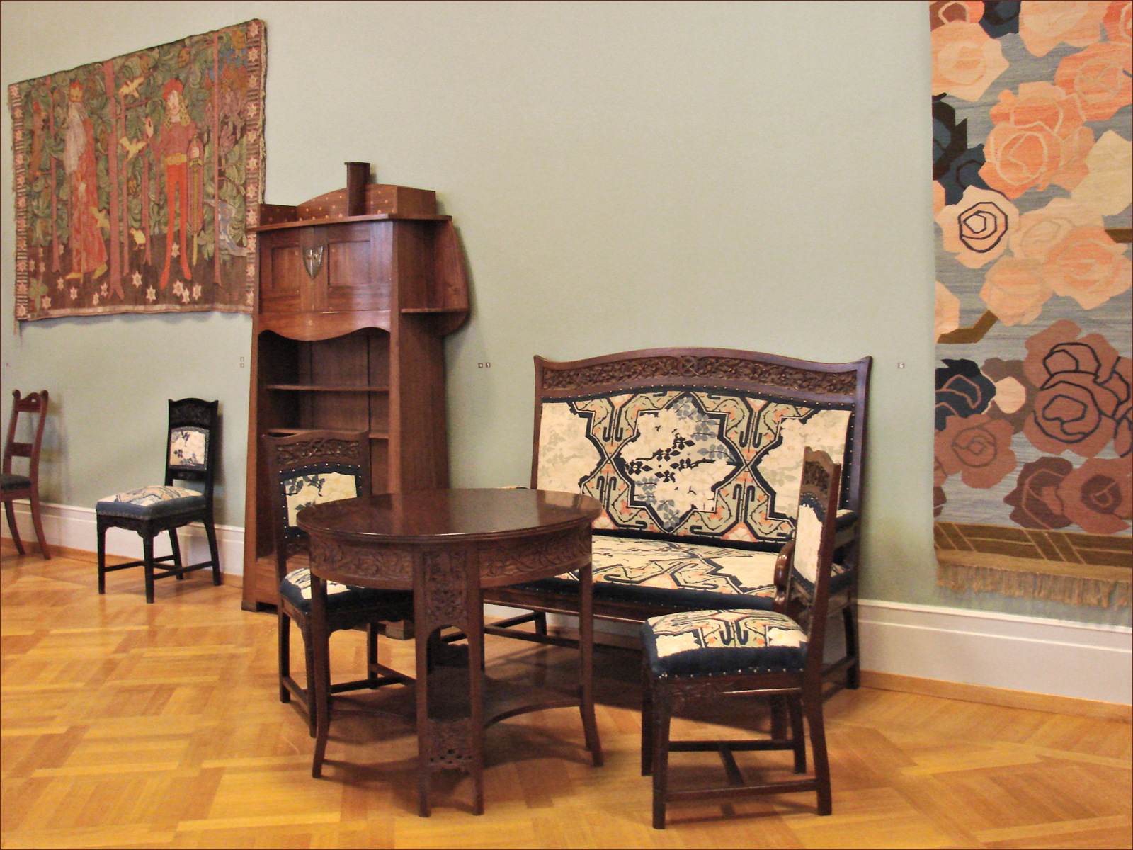 A gauche, au mur tapisserie de Gerhard Munthe "Den Kloge Fugl" "The Wise Bird" 1903. Atelier de Trondheim, (style néo-médiéval) A droite, tapisserie de Frida Hansen, Kristiania / Oslo, 1900 "Red Roses" Au centre, dressoir (?) (drawing room cupboard) conçu par Henrik Bull, fabriqué par Magnus Pedersen Oslo, 1907 Au centre, ensemble de meubles en acajou, conçus et fabriqués par Johan Borgersen, 1905 Les tissus sont de Frida Hansen Le musée d'Art industriel fait partie du musée national d'Art, d'Architecture et de Design. Il expose de l'artisanat, de la mode et du design norvégiens et étrangers du 7e siècle à nos jours. Le musée abrite notamment la plus belle collection de Norvège de tapisseries des 16e et 17e siècles et de riches collections d'argenterie, verrerie, céramique et meubles. Il possède un département sur l'art d'Extrême-Orient et une Galerie royale de costumes (incluant la garde-robe royale, qui présente les robes des reines de Norvège depuis la Reine Maud)